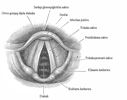 Opis usne šupljine.